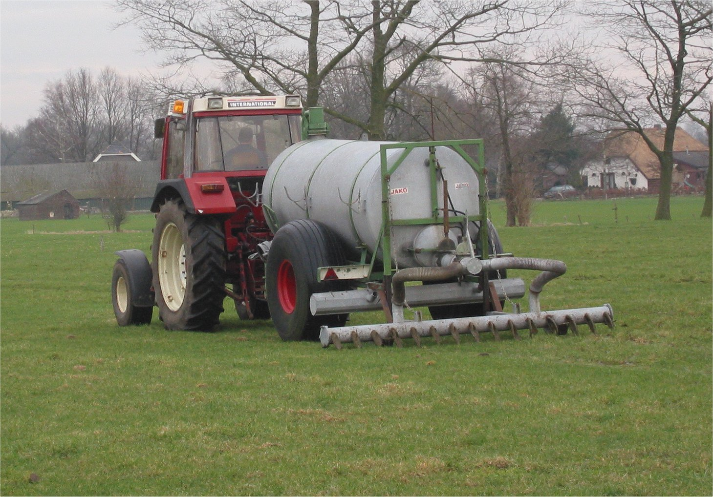 Sleufkouterbemester – cf. Image:Sleufkouterbemester gleufjes.jpg